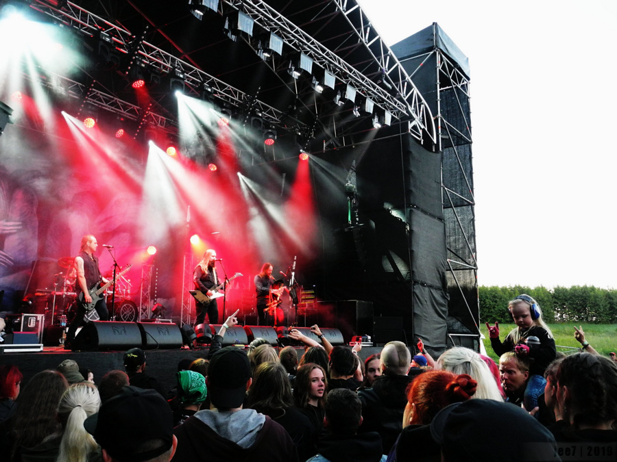 Ansambel Metsatöll esinemas muusikafestivalil Hard Rock Laager 2019.